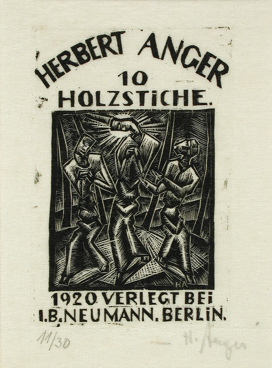 10 Holzstiche